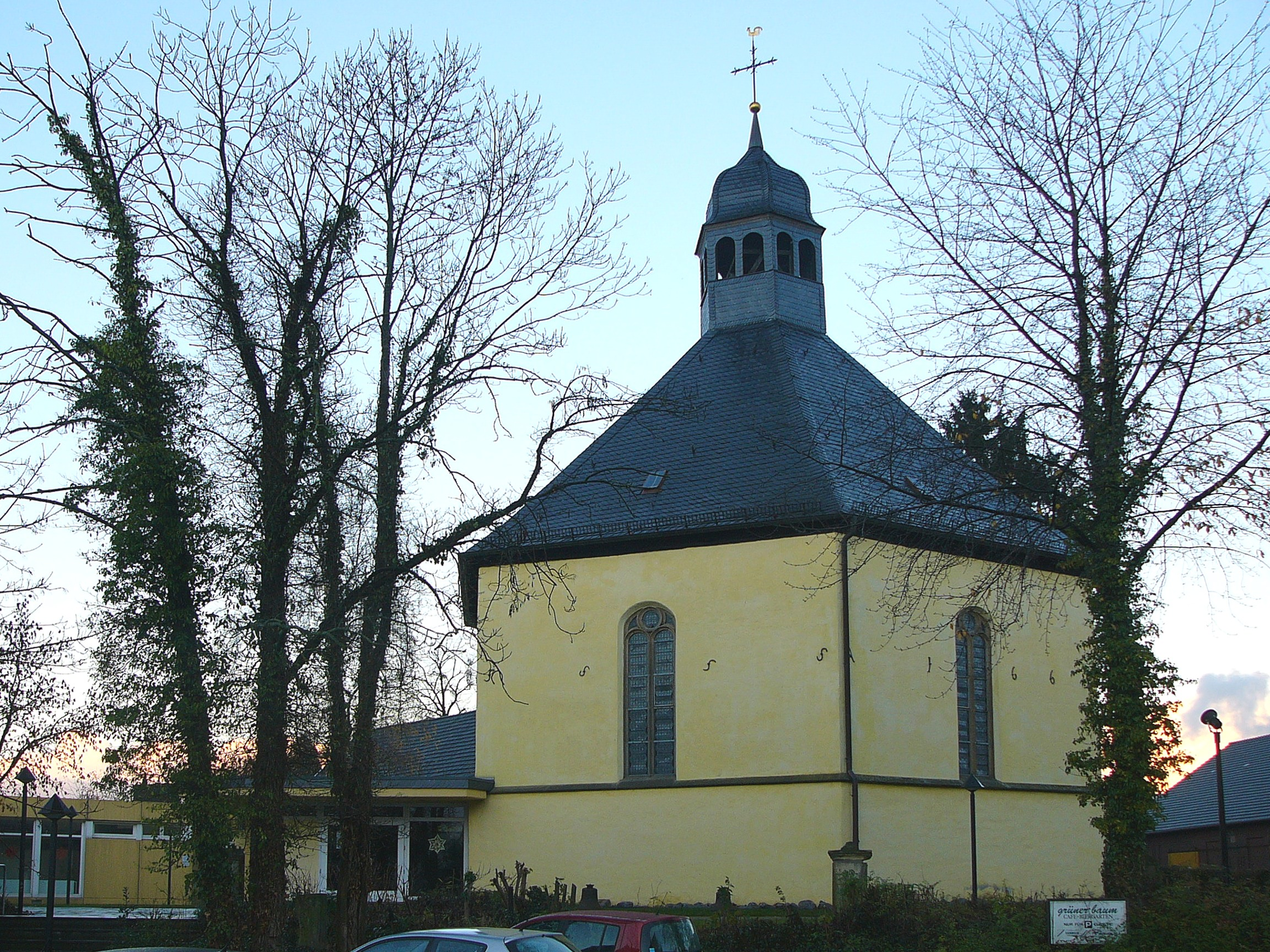 Ev. Pfarrkirche Rhynern.This is a photograph of an architectural monument., no. 28